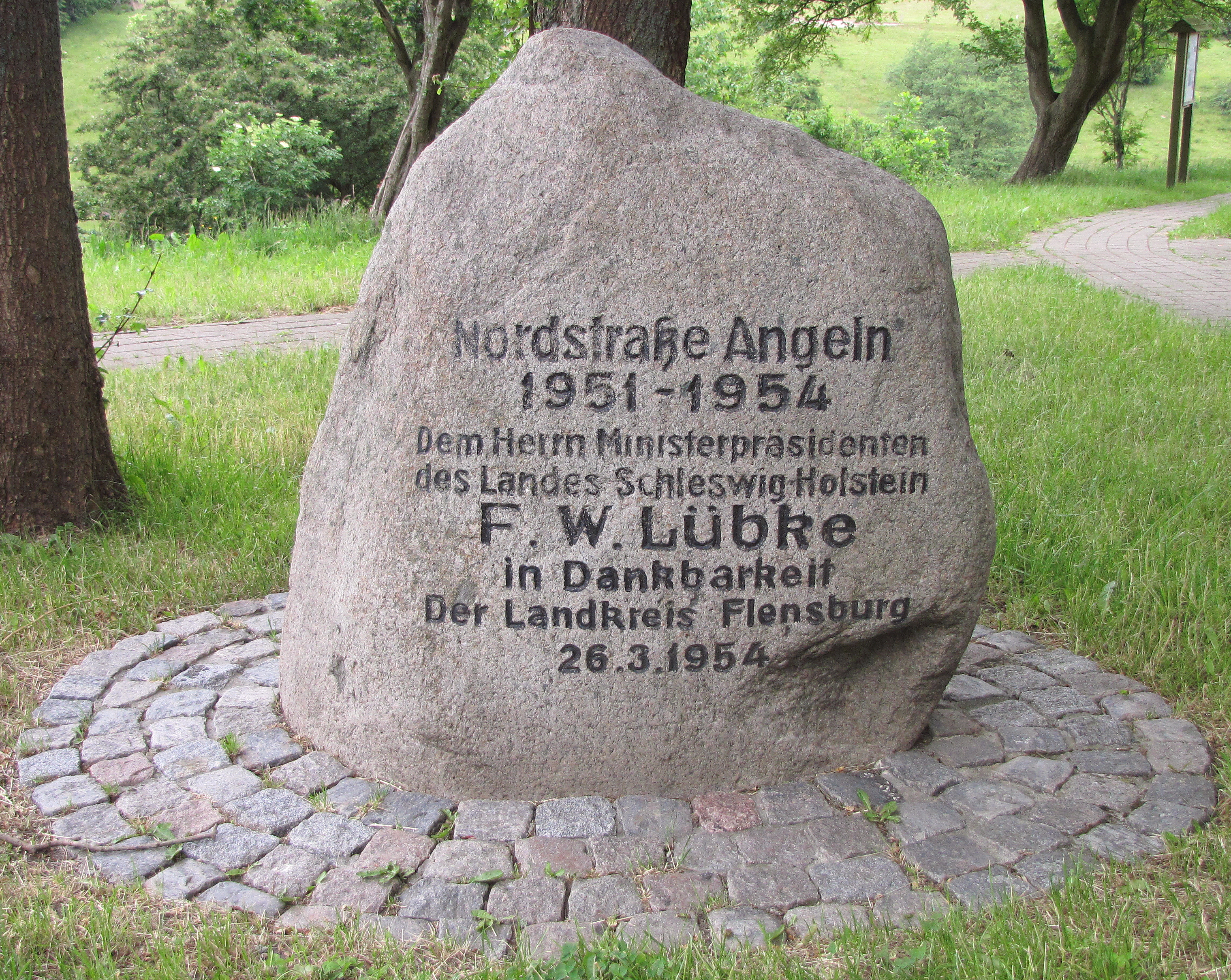 Gedenkstein vom 26.03.1954 zum Dank an Ministerpräsident von Schleswig-Holstein H. F.W. Lübke für die Errichtung der Nordstraße in den Jahren 1951 - 1954 in Angeln, heute Bundesstraße 199, B 199 - Foto 2012 Wolfgang Pehlemann IMG_7804